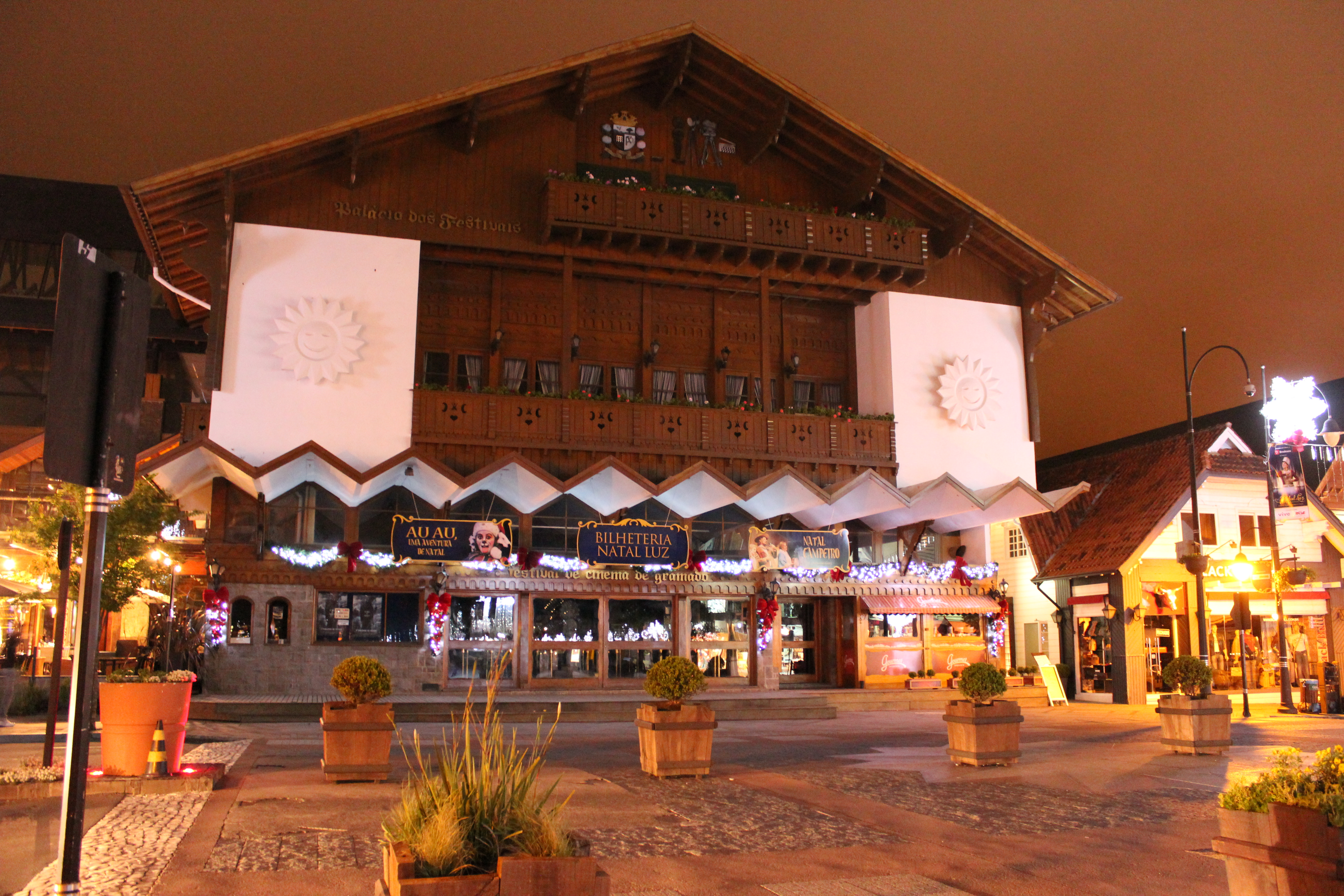 Foto do Palácio dos Festivais no Natal Luz 2012